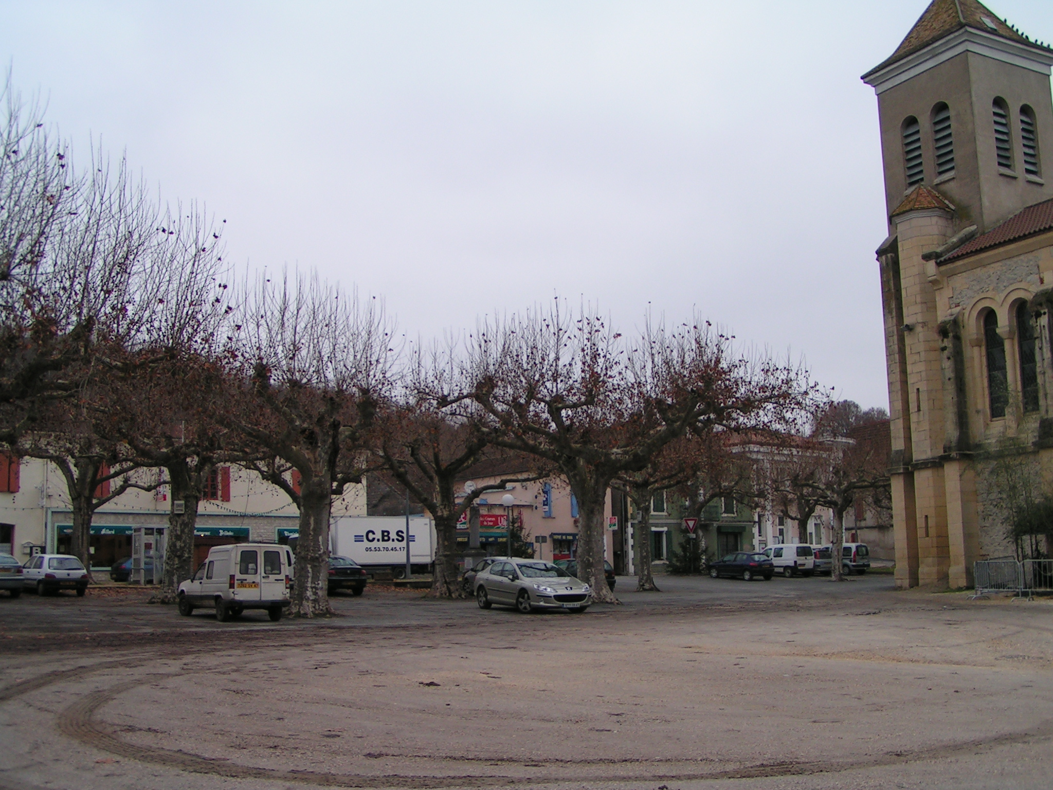 Dausse